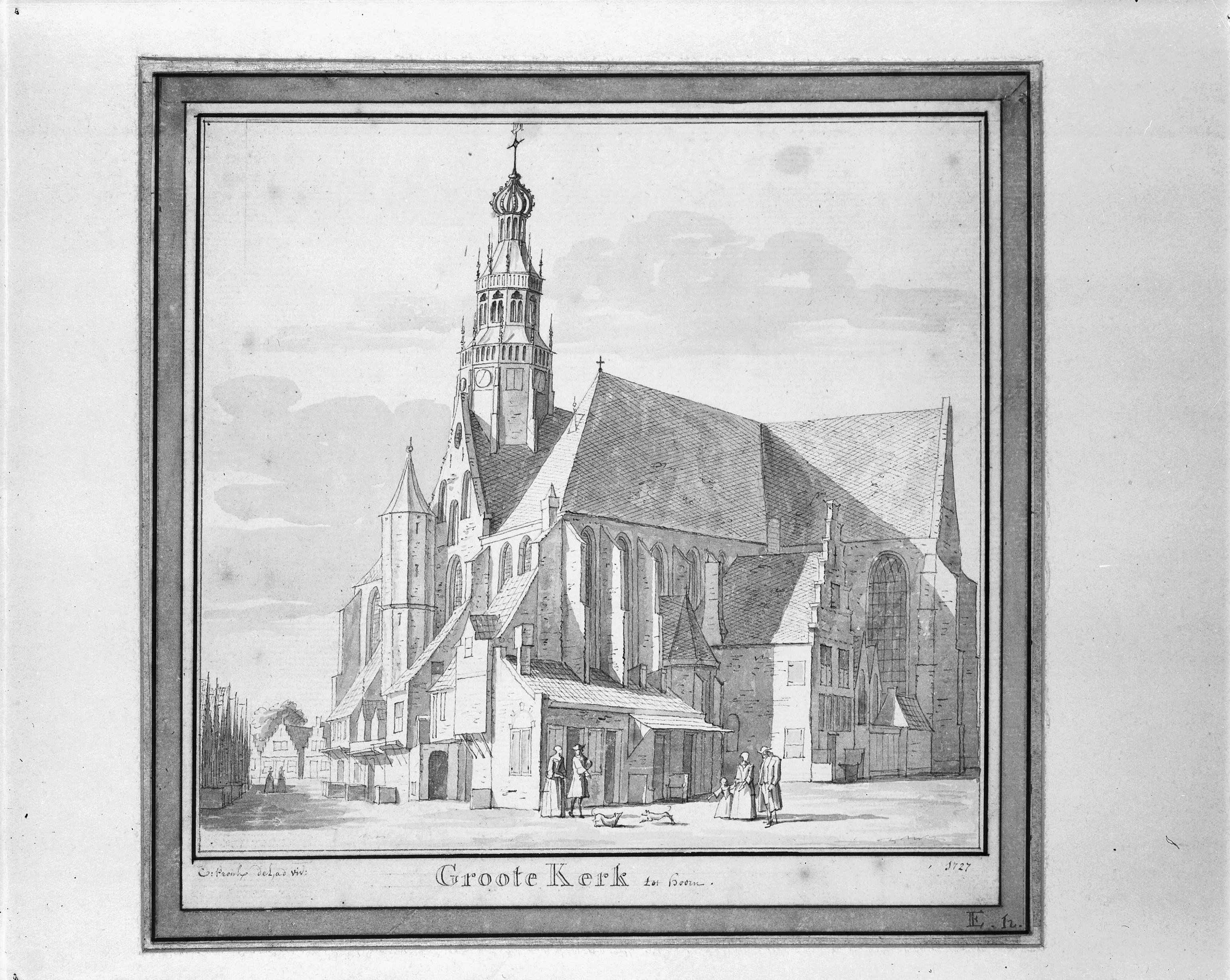 Grote Kerk N.H.: grote kerk gezien vanuit het zuid-westen tekening C.Pronk 1727 Westfries Museum